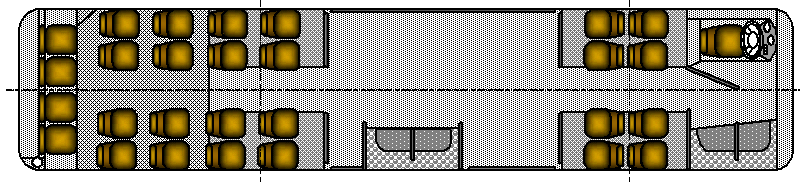 Варіант планування салону автобуса MAN SL 223 виробництва Man Kamyon Ve Otobus San AS (Туреччина) із 28 сидіннями